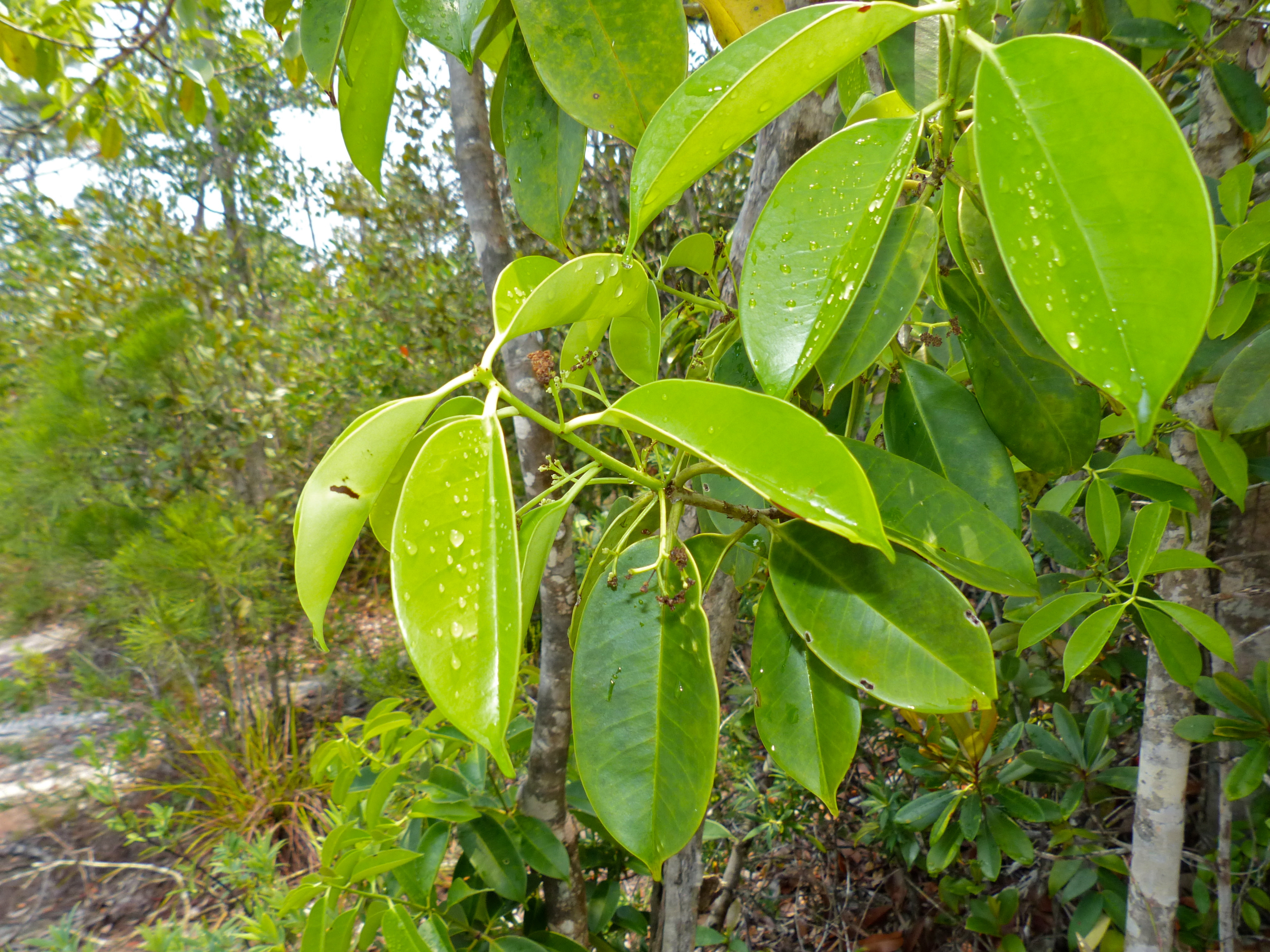 Lintang Trail, Bako NP, Sarawak, MALAYSIA